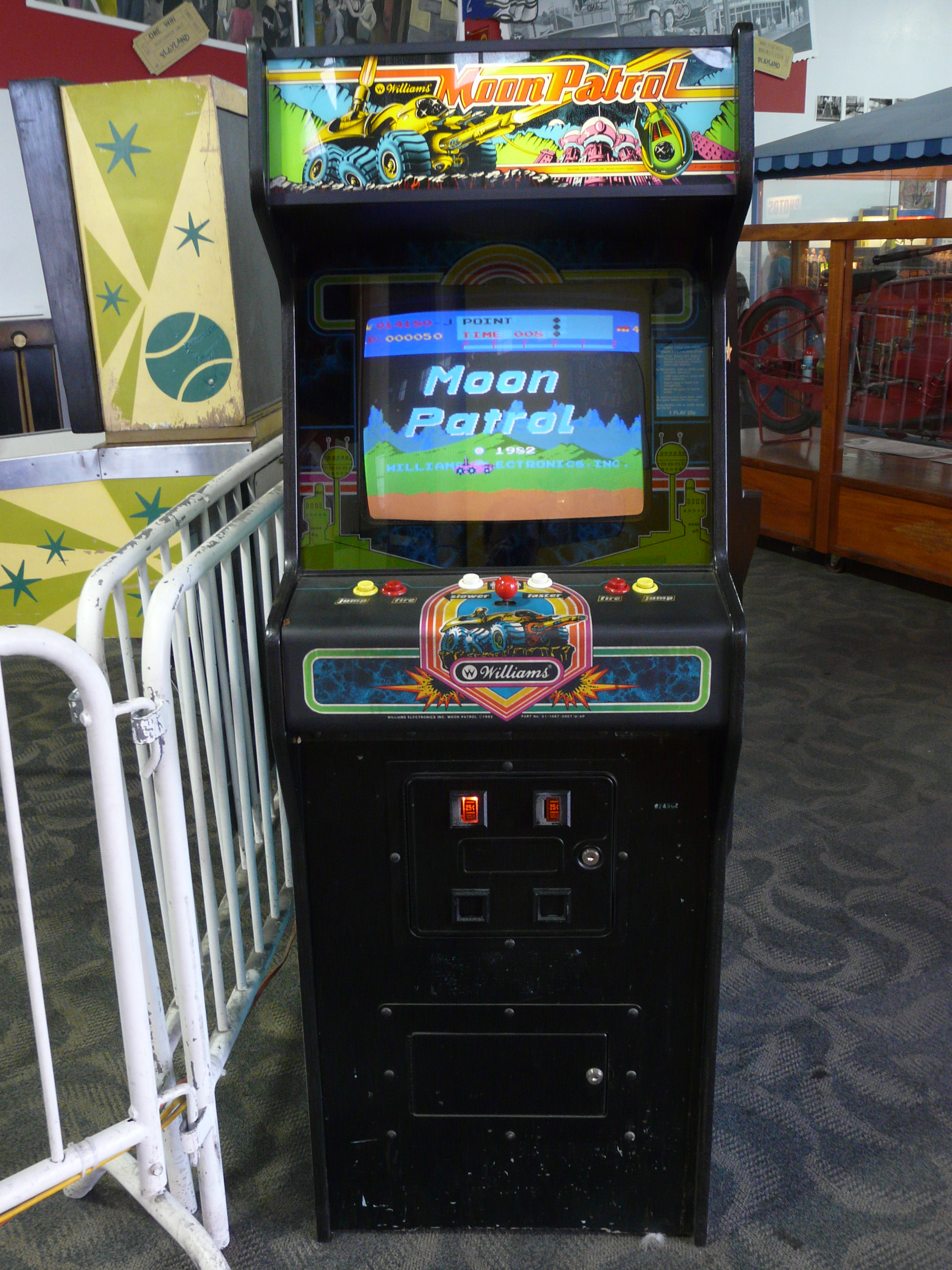 "Moon Patrol", an arcade game.